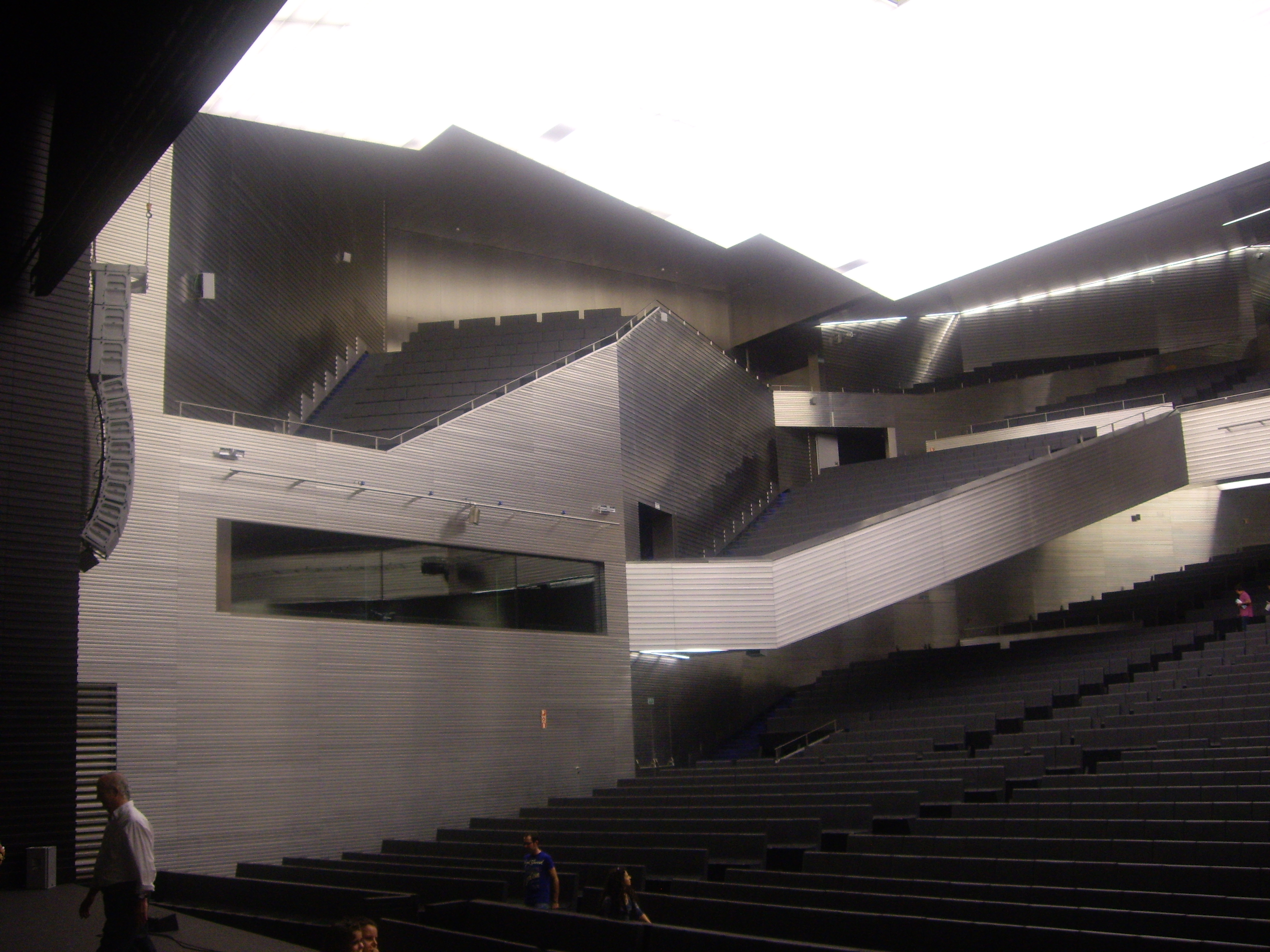 Gradas del auditorio de FIBES